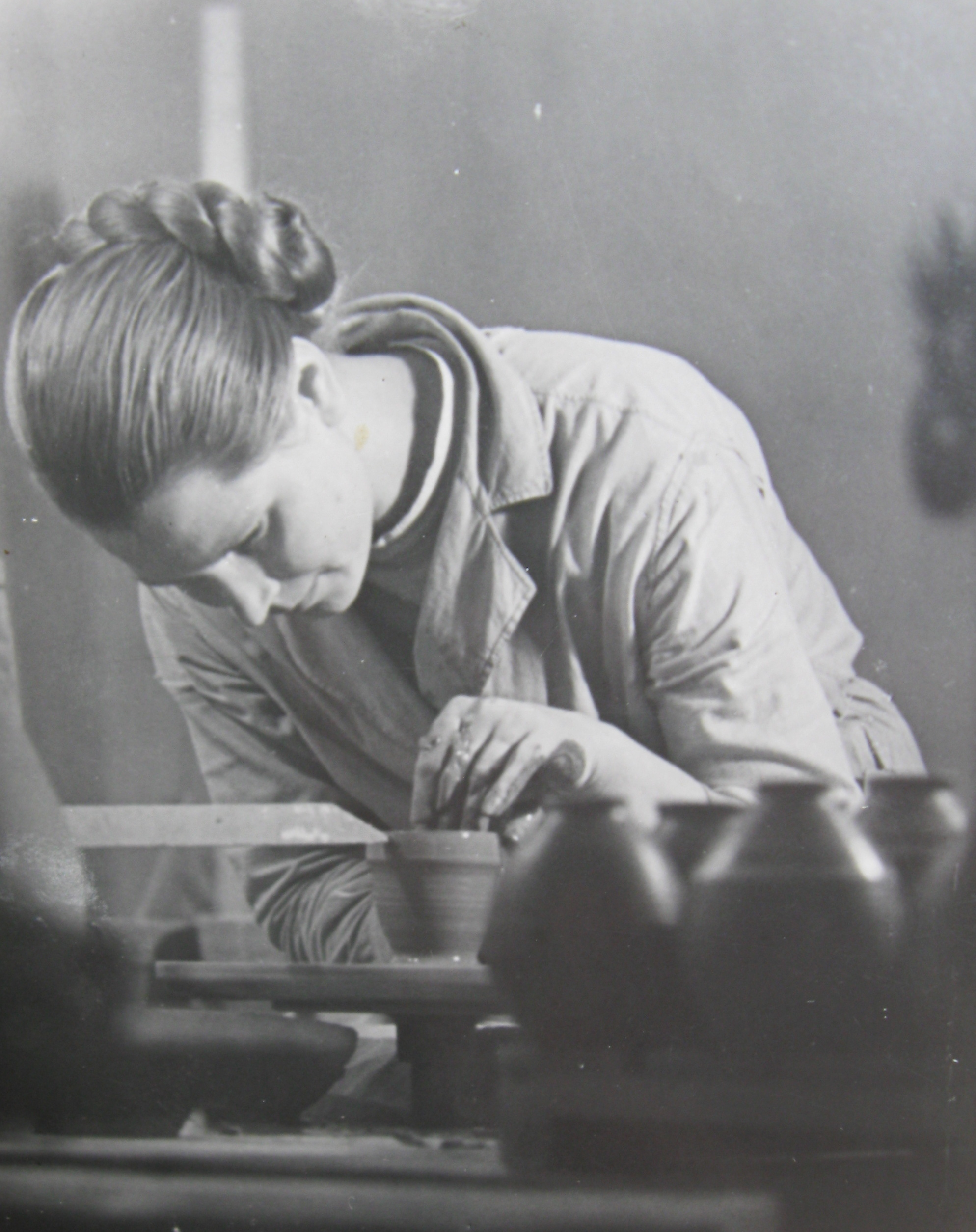 Keramiķe Marija Ozoliņa darba procesā